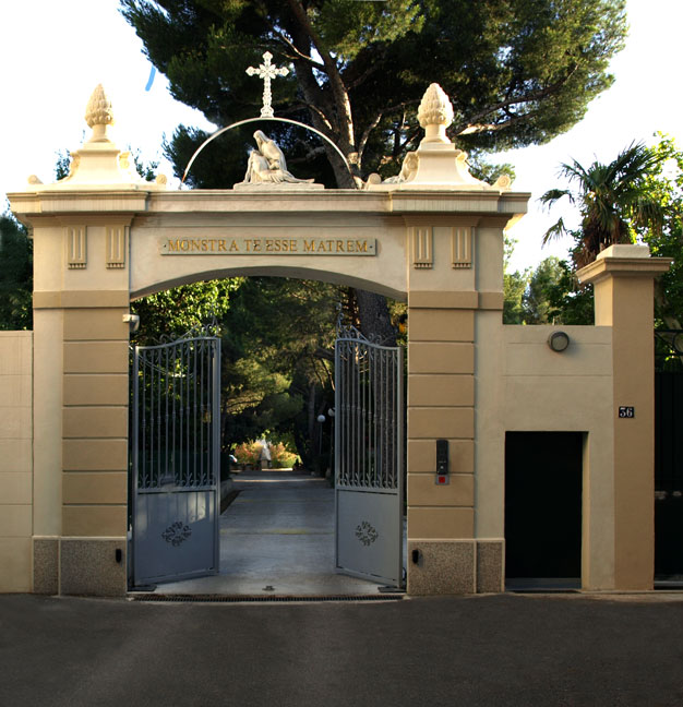 Entrée de la Maison Mère des sœurs de Notre Dame de la Compassion à Marseille.